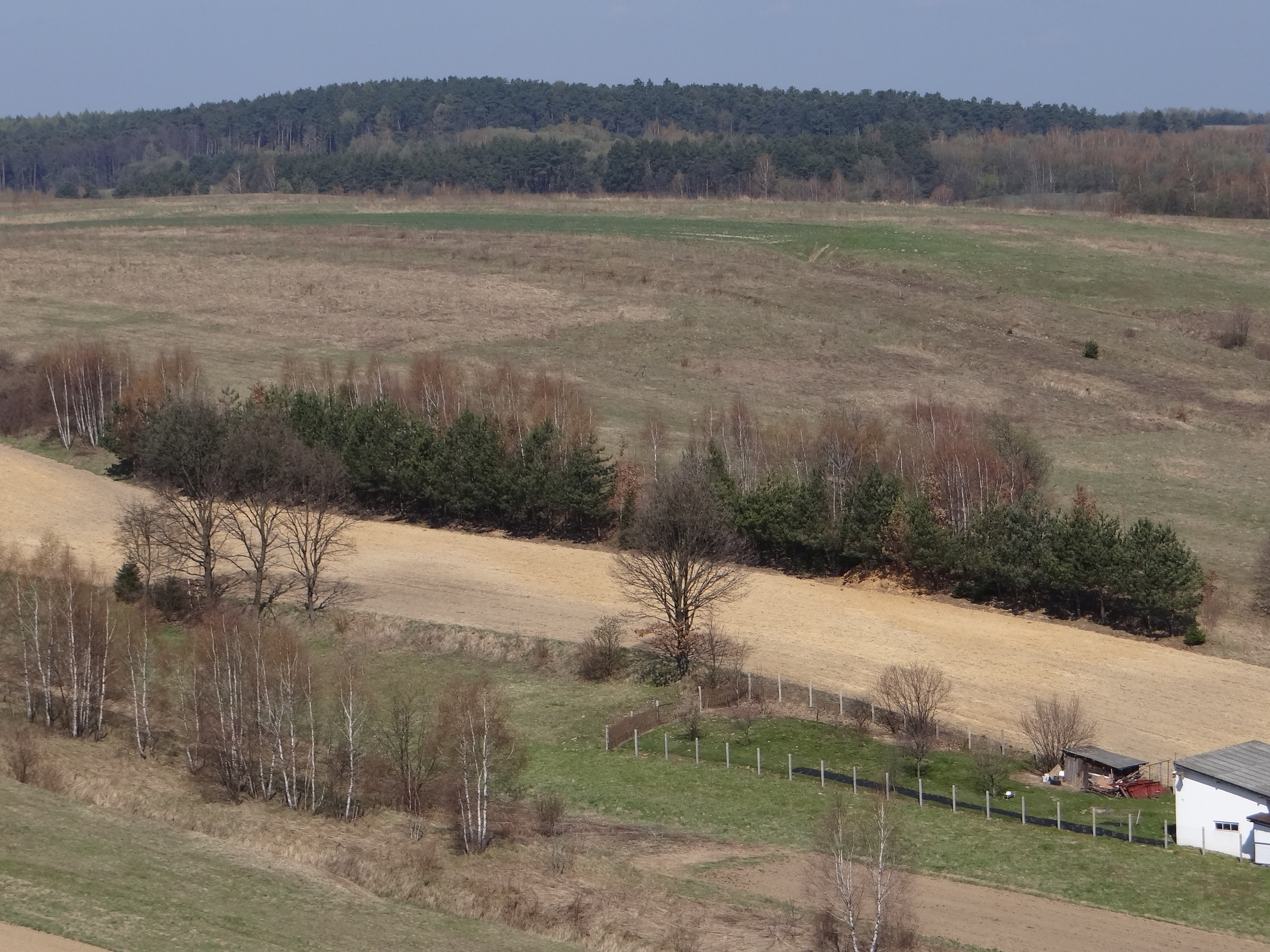 Widok z Powroźnikowej w Racławicach na wzniesienie Skałki